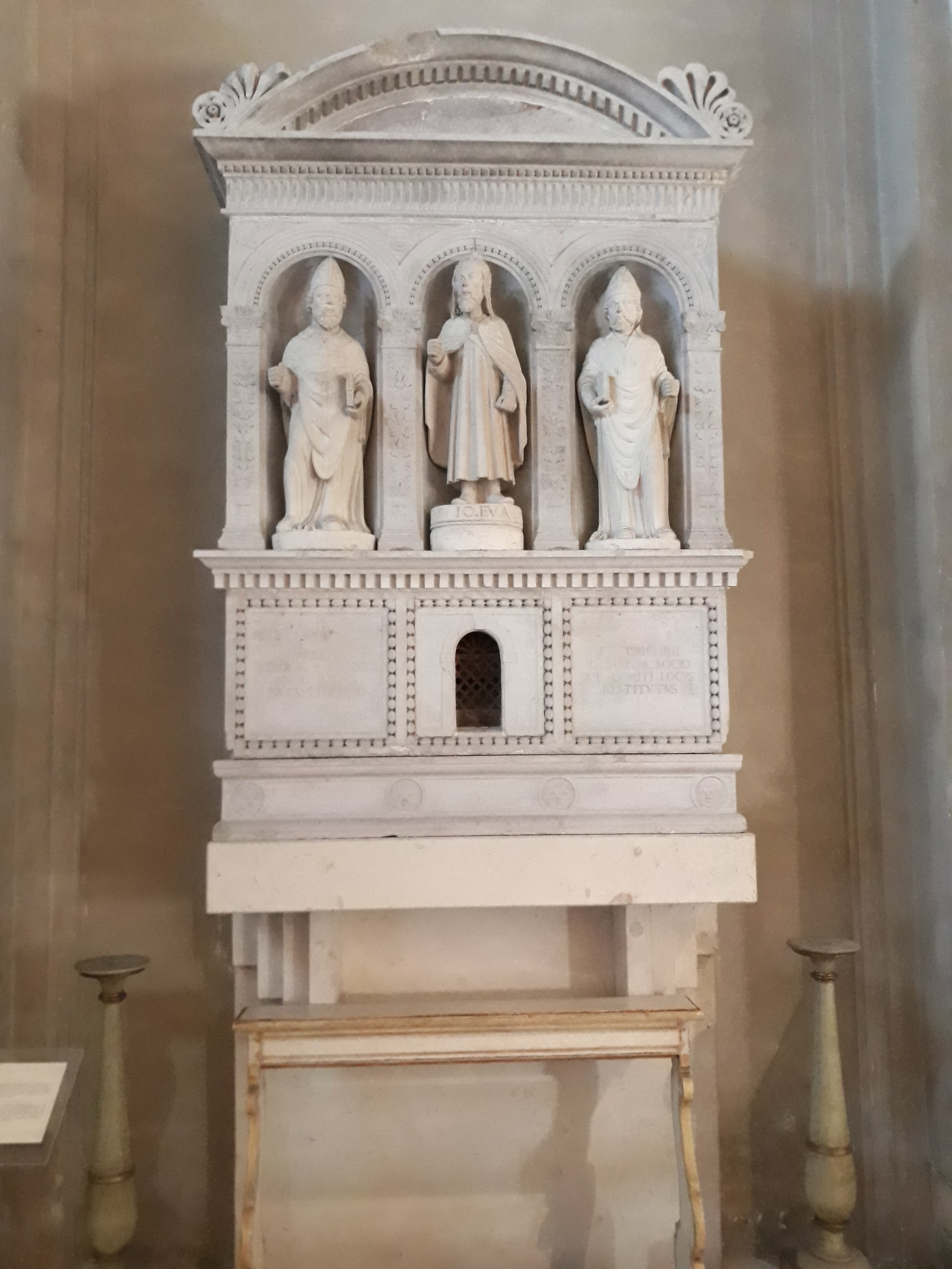 Interno della chiesa di San Procolo a Verona.